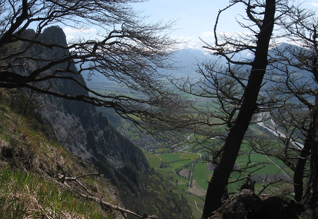 Aus Richtung Guschaspitz der Regitzer Spitz, im Tal Fläsch und der Rhein